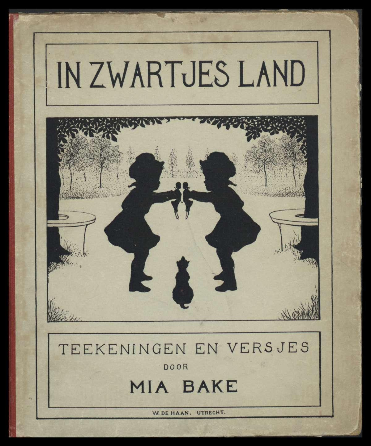 Elf kleuterverhaaltjes in rijmvorm, elk voorzien van een "Zwartje": een illustratie in zwart silhouet.; 1e dr.: 1916; Eerder verschenen o.d.t.: In zwartjesland